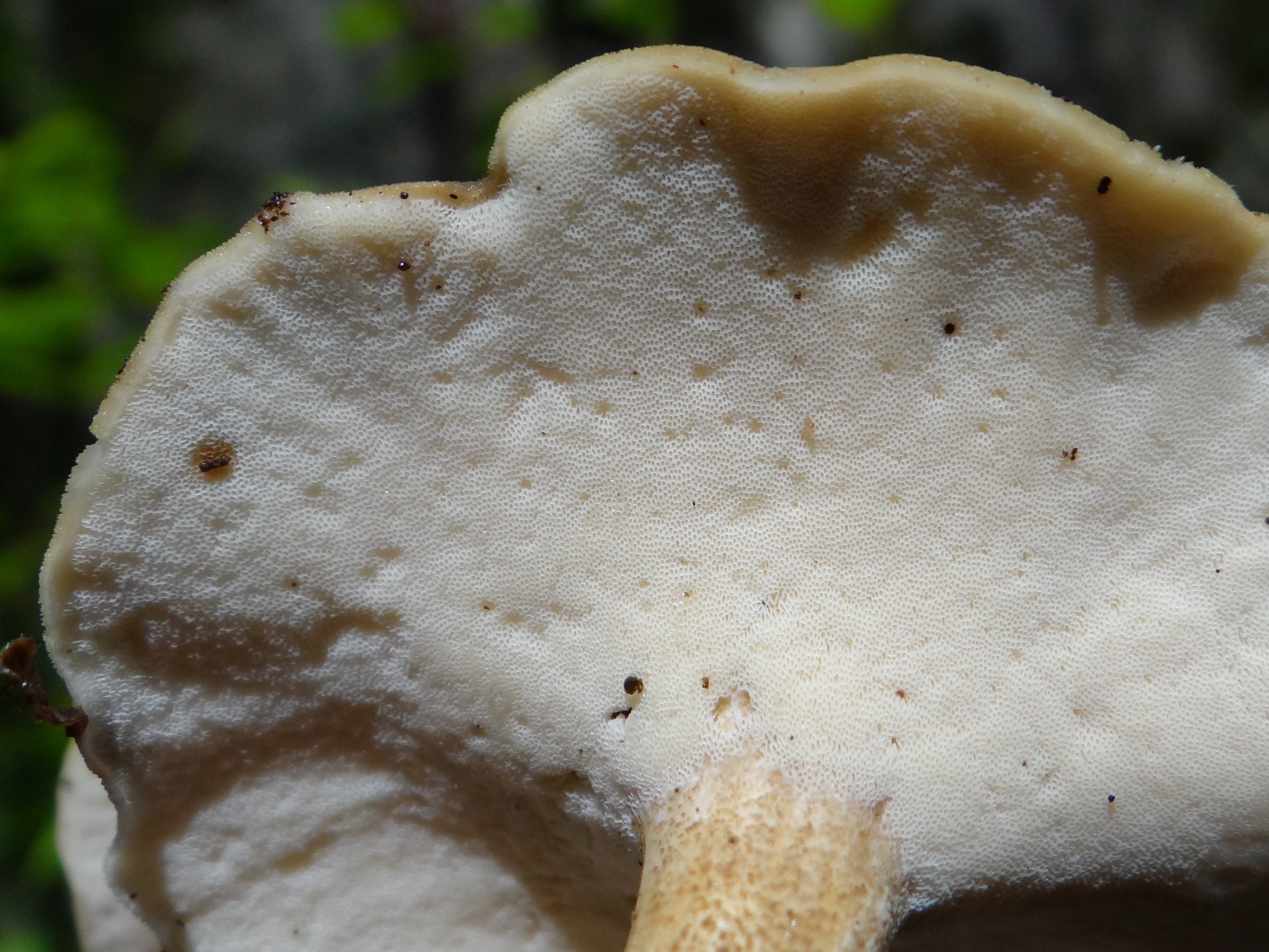 Polyporus ciliatus (location: Poland, Dolina Mnikowska, Mników)